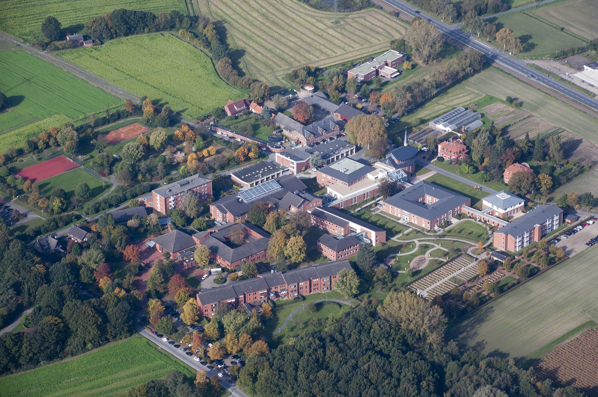 St. Rochus-Hospital Telgte, Luftbild aus Südosten (2017)